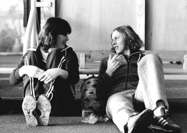 Andrea Reichstein, Rosemarie Ackermann im Gespräch ADN-ZB Mittelstädt 12.1.80 Berlin: Hallen-Leichtathletik-Sportfest. Im Hochsprung der Damen siegte überraschend Andrea Reichstein (SC DHfK-links) mit 1.89 vor Rosemarie Ackermann (Andrea Bienias) (SC Cottbus) . Unser Bild zeigt die beiden Athletinnen bei einem Meinungsaustausch nach dem Wettkampf. (s.a. W0112-28 u.29N)